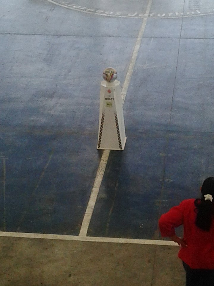 Encuentro de semifinal entre el Lyon y el Bucaramanga